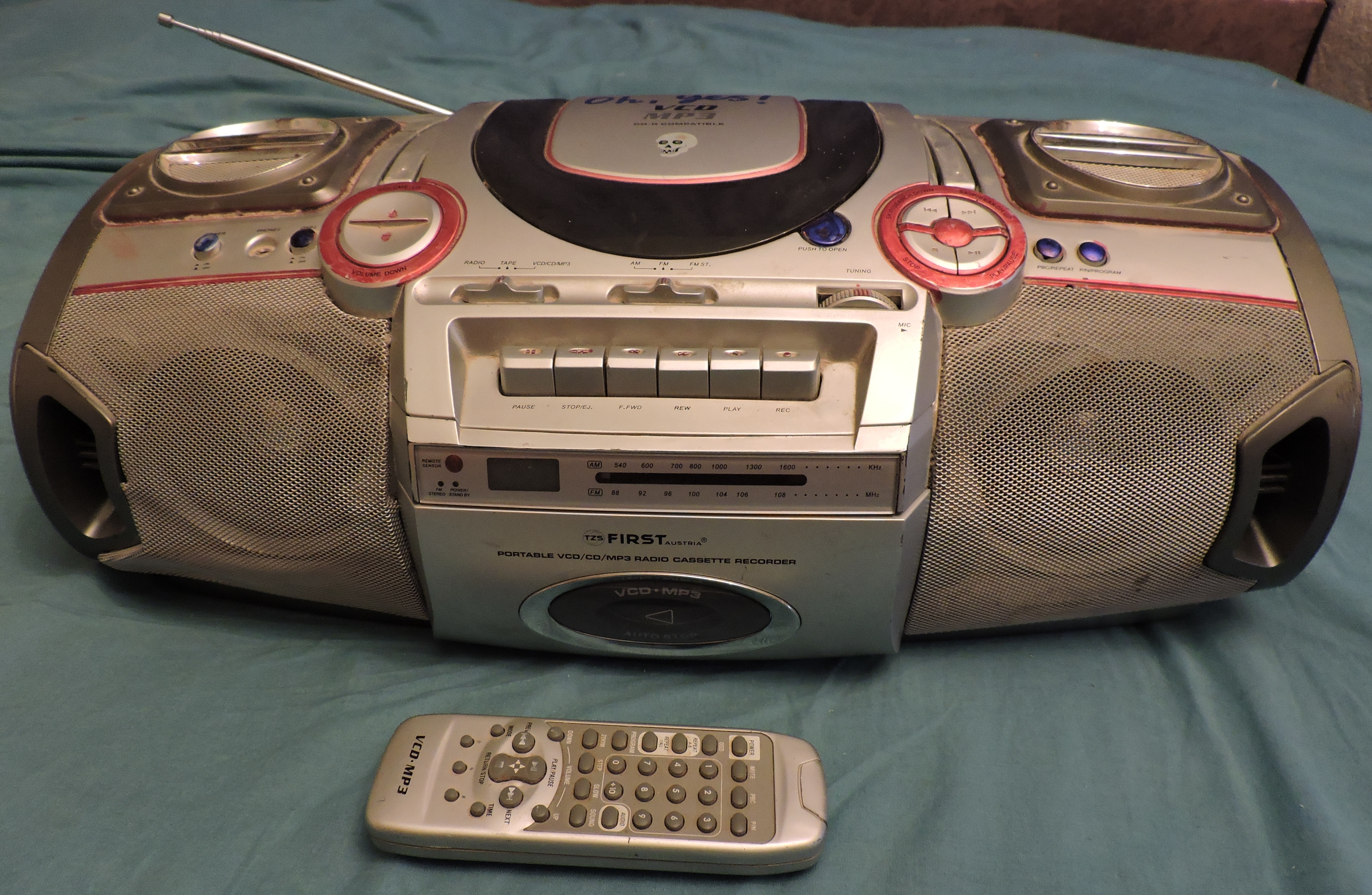 Бумбокс First Austria 1141 и пульт ДУ от него